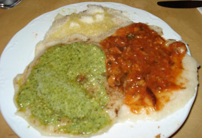 Testaroli, piatto tipico della Lunigiana, Italia.